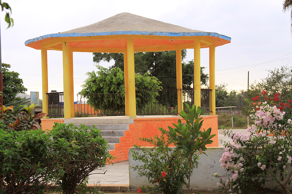 Kiosko del Jardín de Emiliano Zapata, Jal.